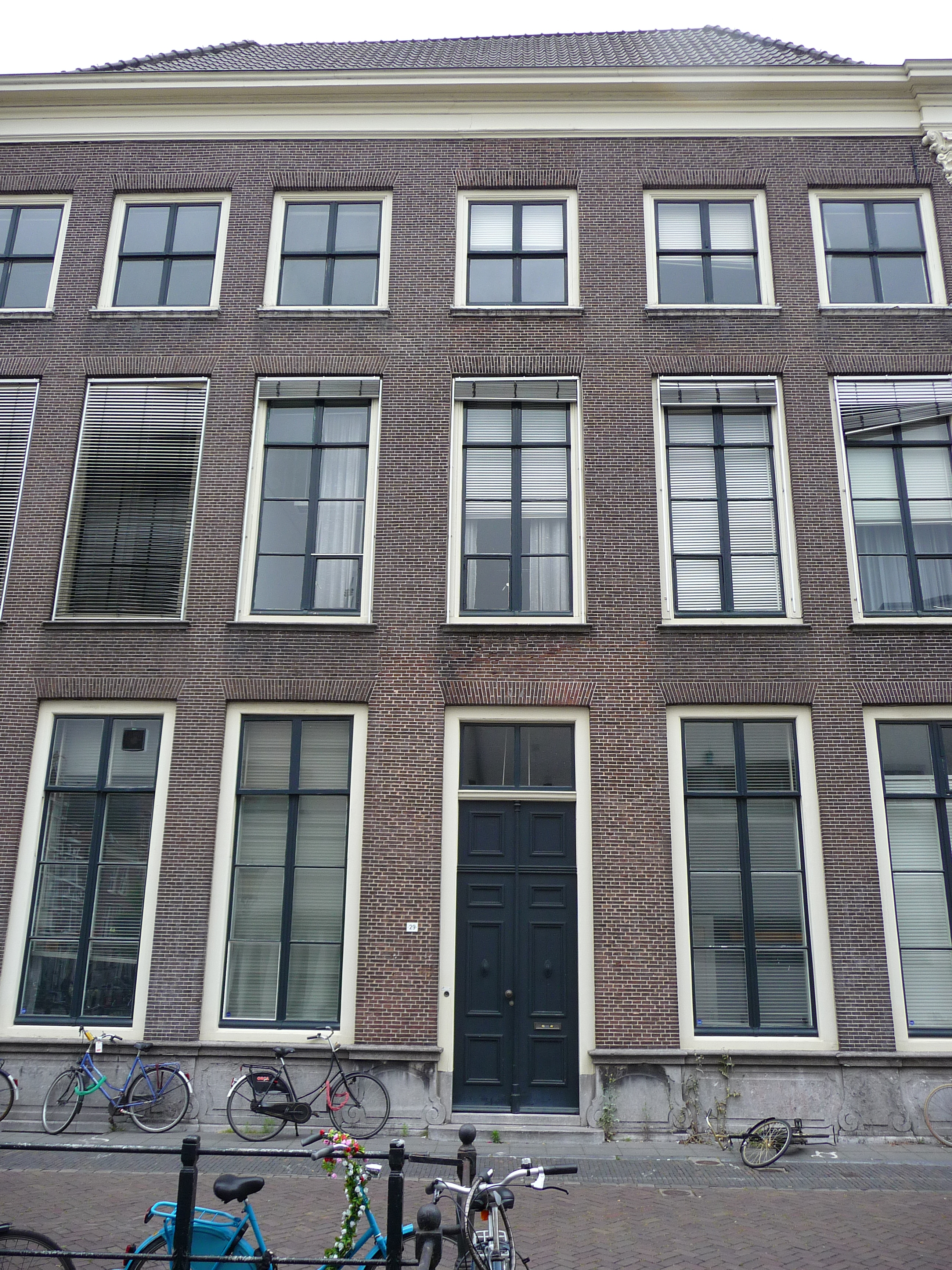 Rijksmonument aan de Drift in Utrecht